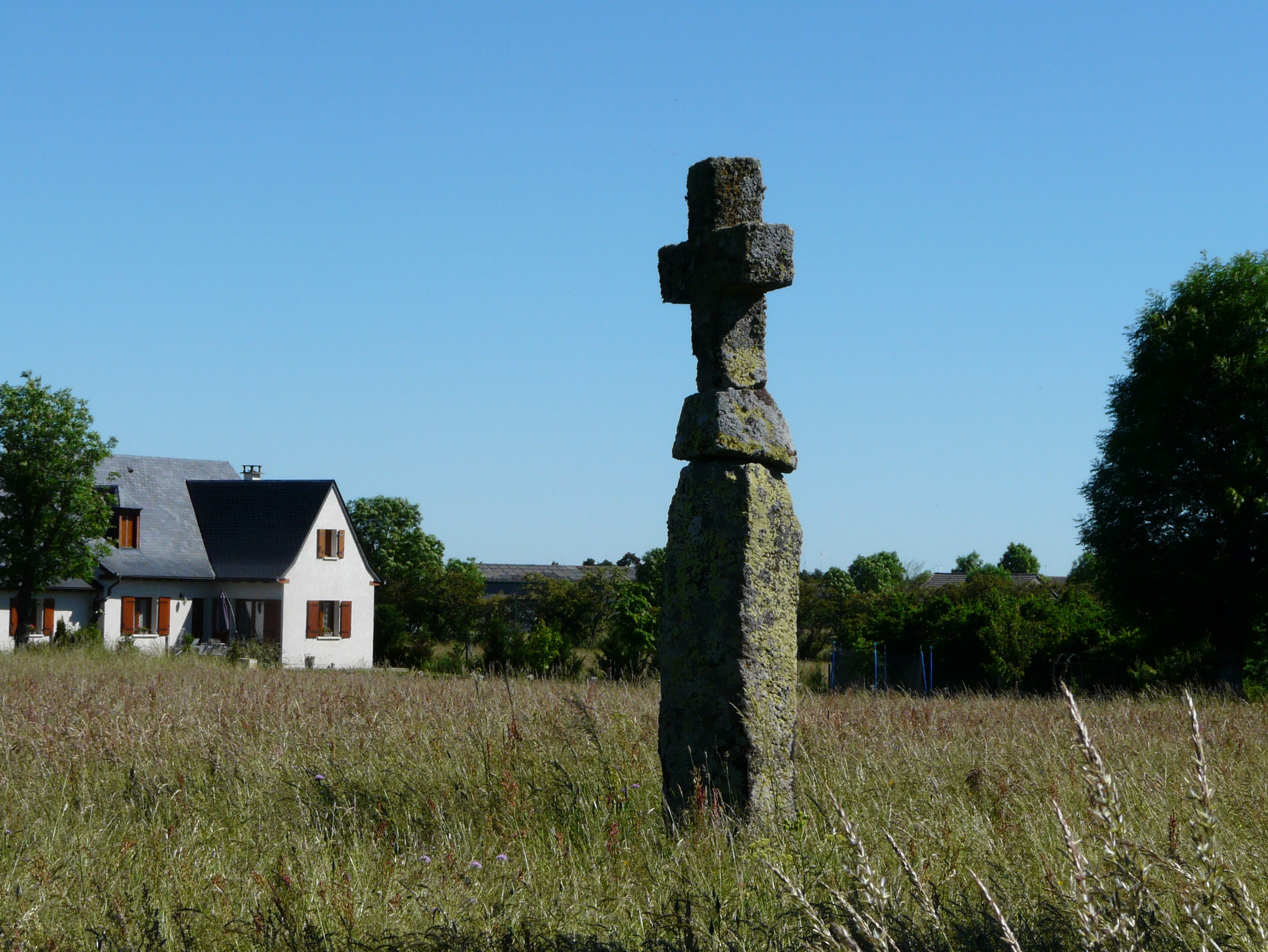 Le menhir christianisé de la Croix-Grosse, Sériers, Cantal, France.